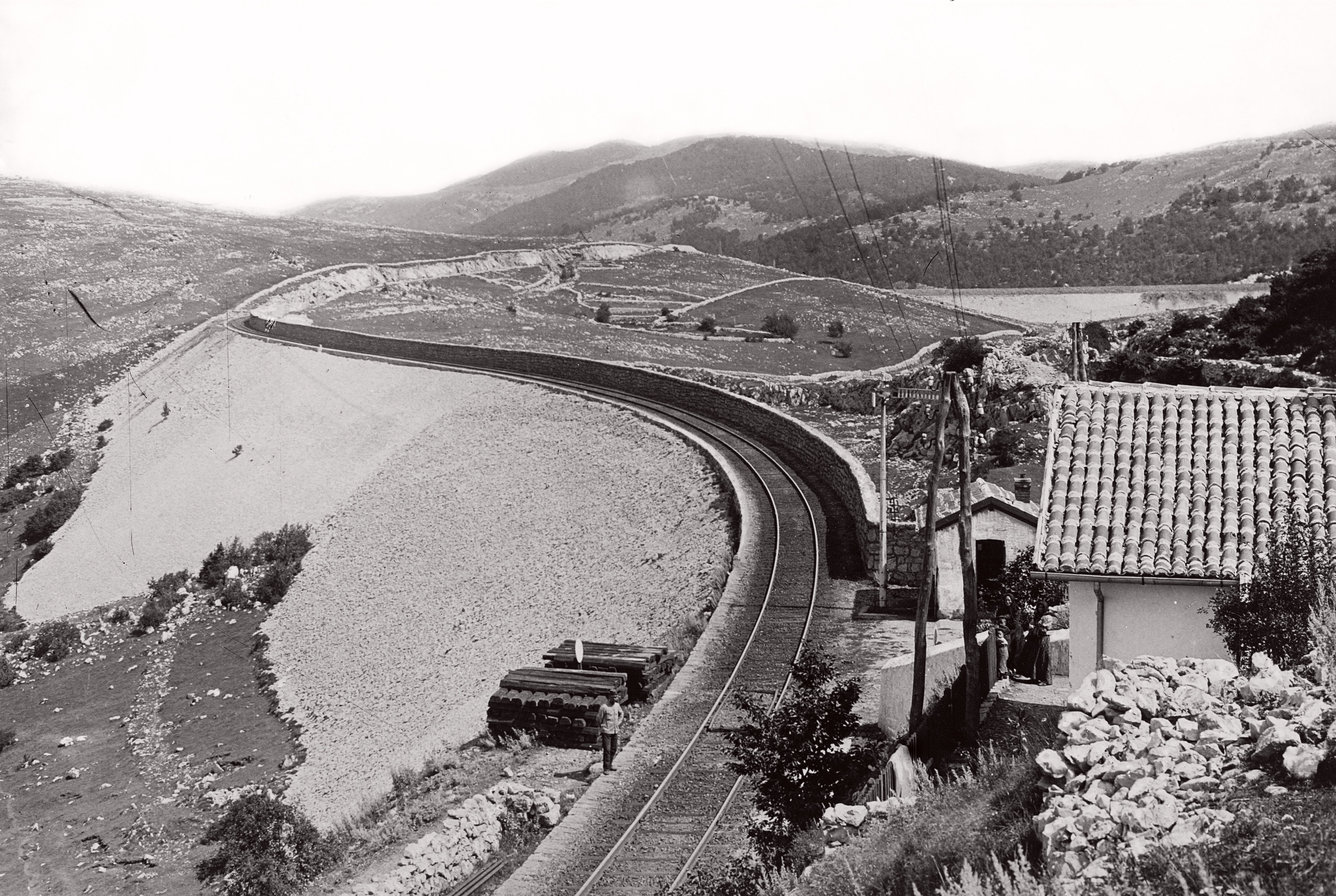 a Zágráb - Fiume vasútvonal Plase településrész és Zlobin között. Location: Croatia, Hreljin Title: a Zágráb - Fiume vasútvonal Plase településrész és Zlobin között.